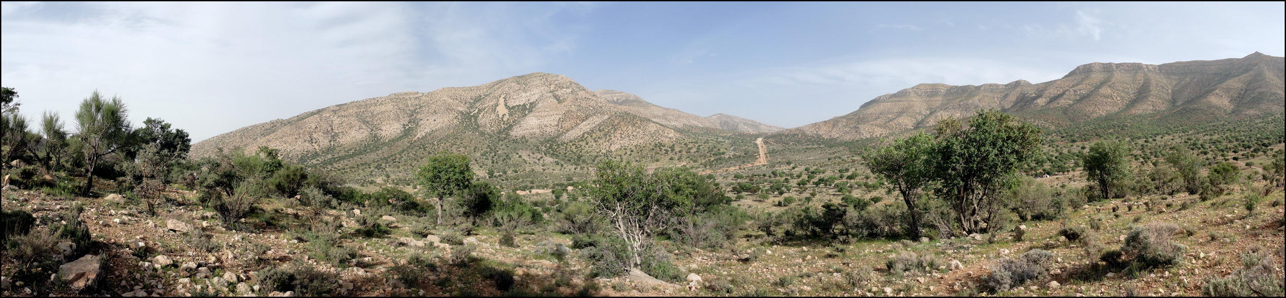 Ghanimi Jungle جنگل غنیمی